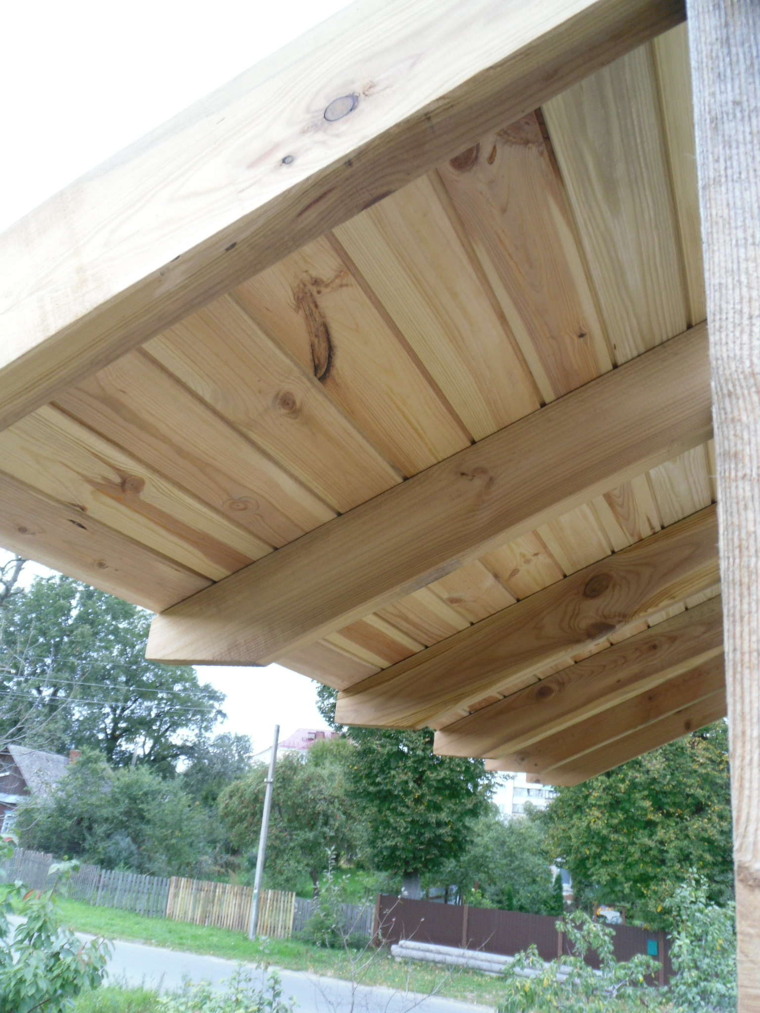 Подшивка свеса кровли вагонкой